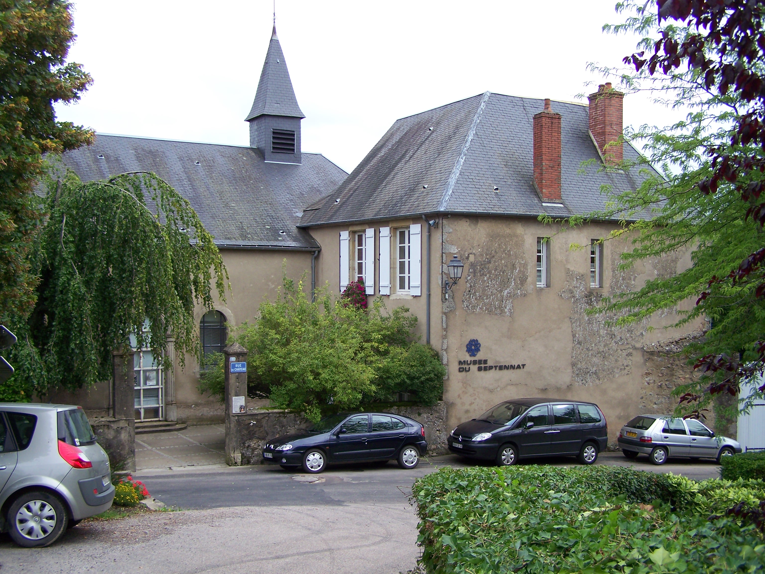 Musée du Septennat de François Mitterrand à Château-Chinon (Ville) (Nièvre, France).